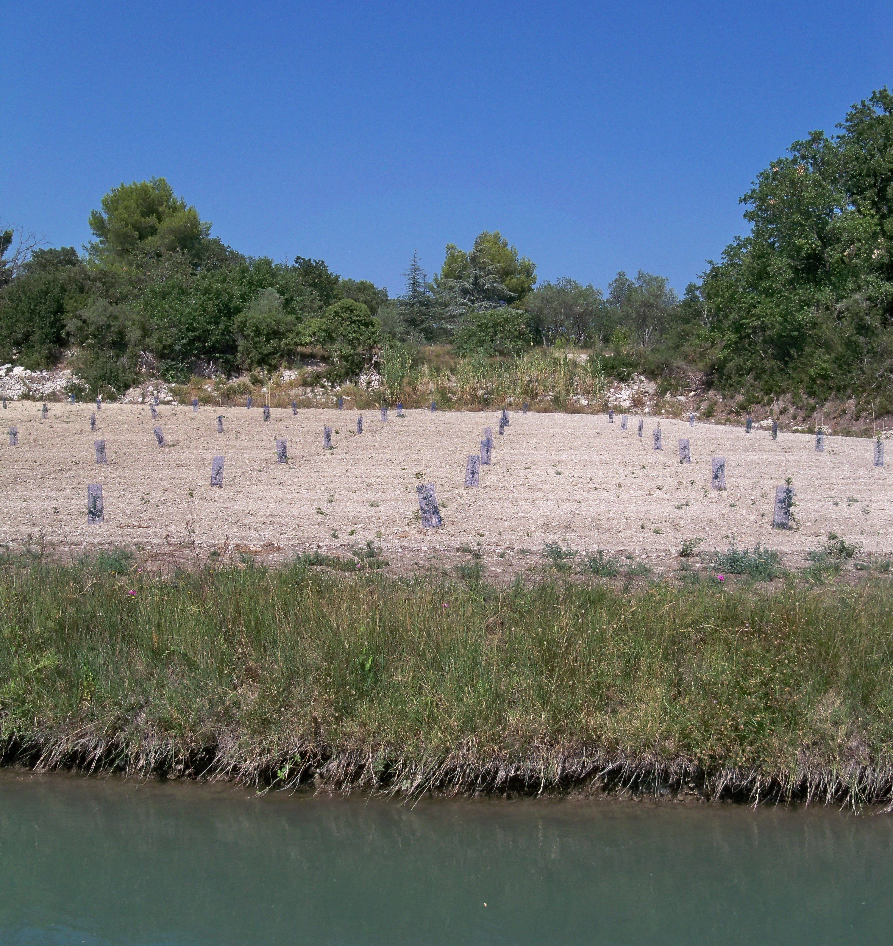 Truffière en devenir à Velleron (84)